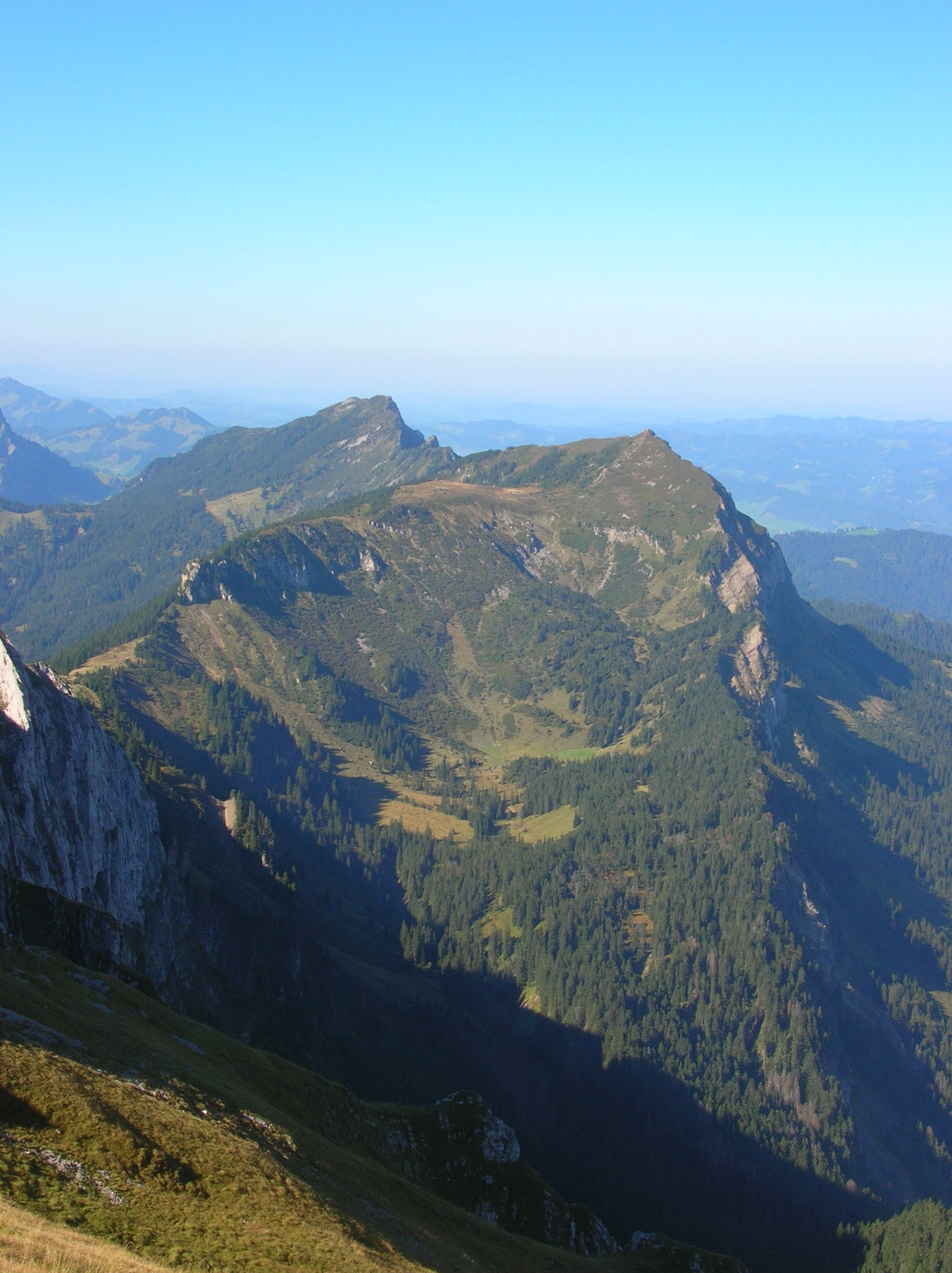 Mittaggüpfi (rechter Gipfel) und Stäfeliflue (linker Gipfel), vorne Oberalp mit Pilatussee